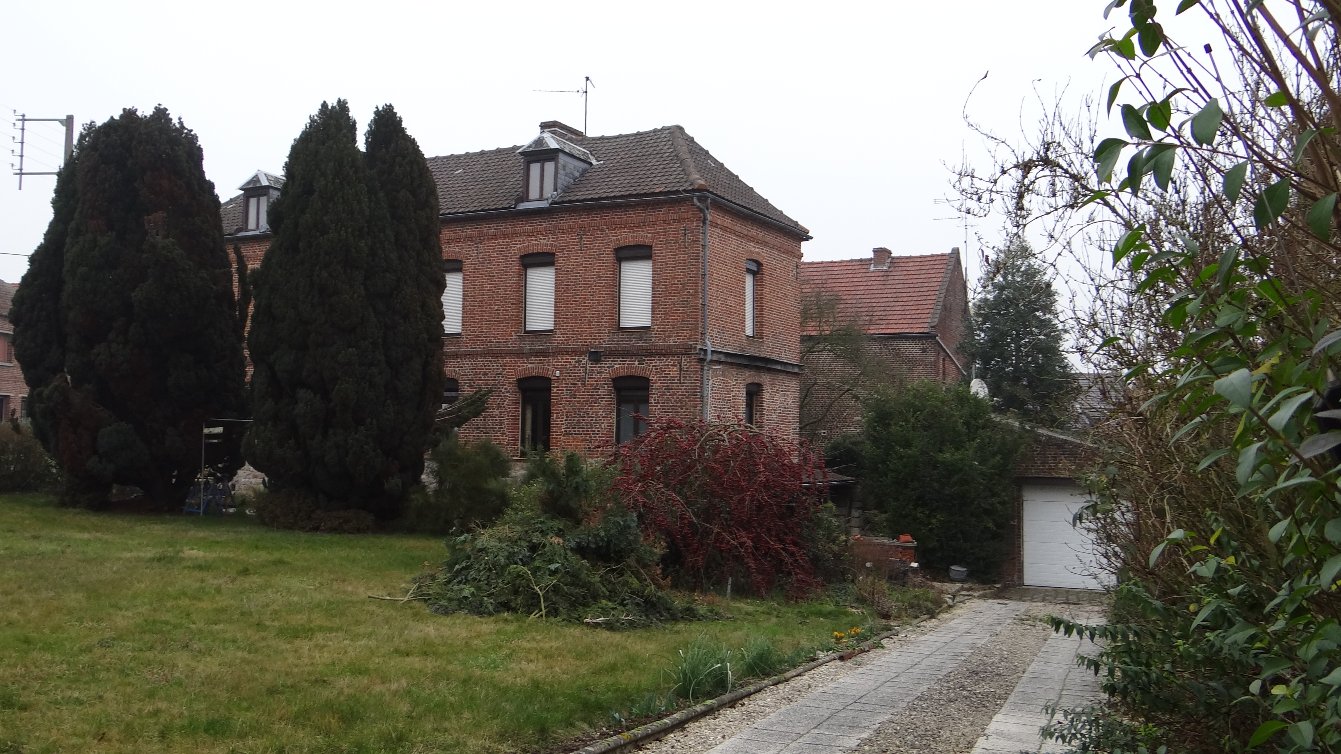 Lécluse (12) - Maison de Elisa Moncomble-Dujardin où Paul verlaine séjourna